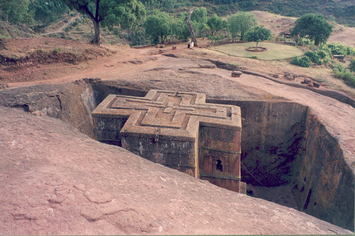 Die Kirche Bet Giyorgis im äthiopischen Lalibela von oben betrachtet